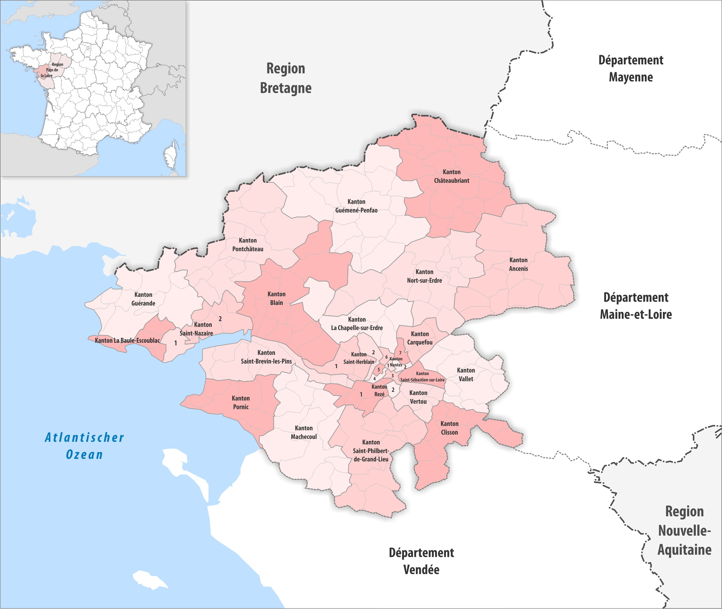 Gemeinden und Kantone im Departement Loire-Atlantique